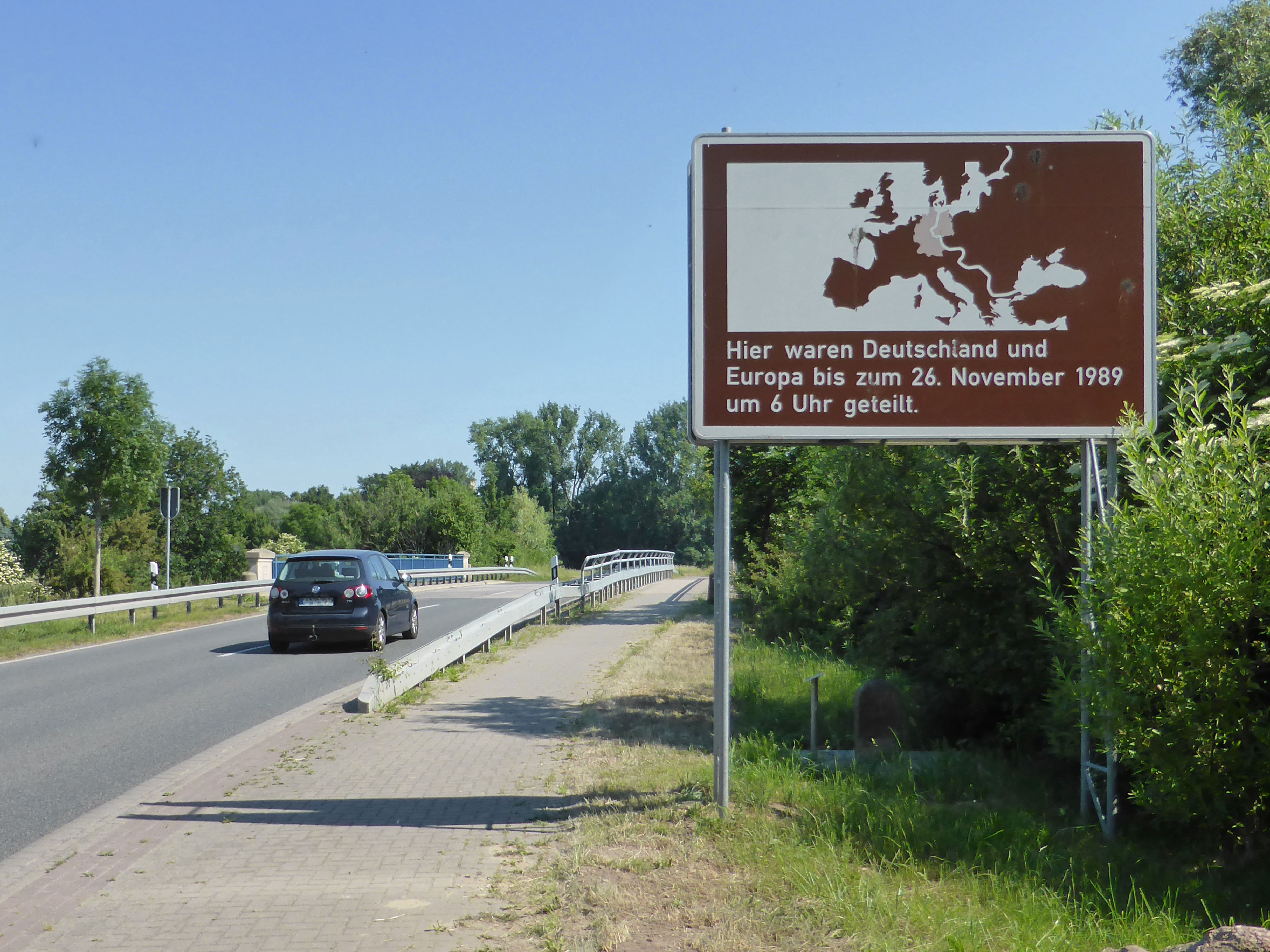 Ehemalige Innderdeutsche Grenze zwischen Büstedt und Oebisfelde, Brücke über der Aller.